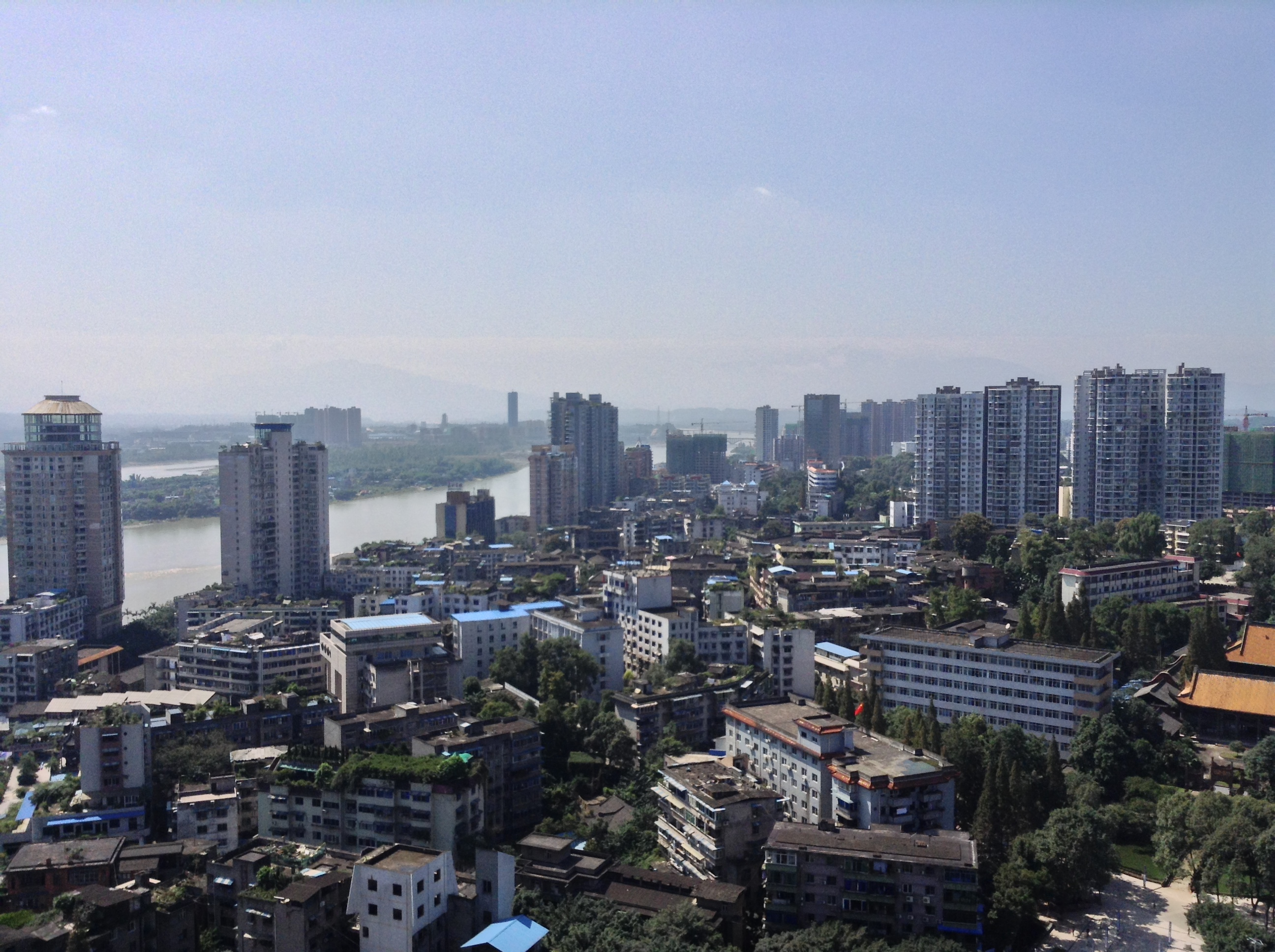 站在高处看乐山